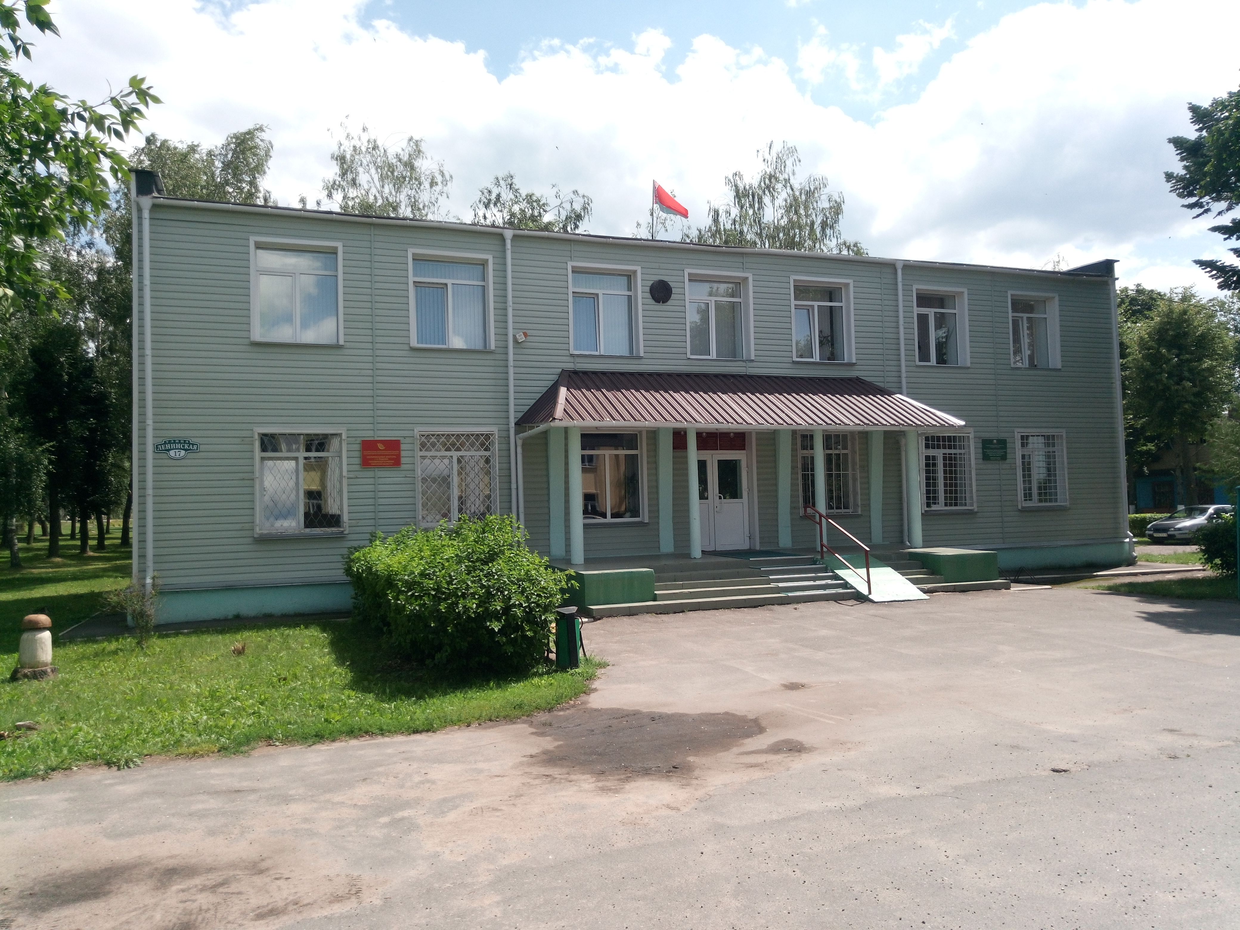 Рудзенскі сельсавет.